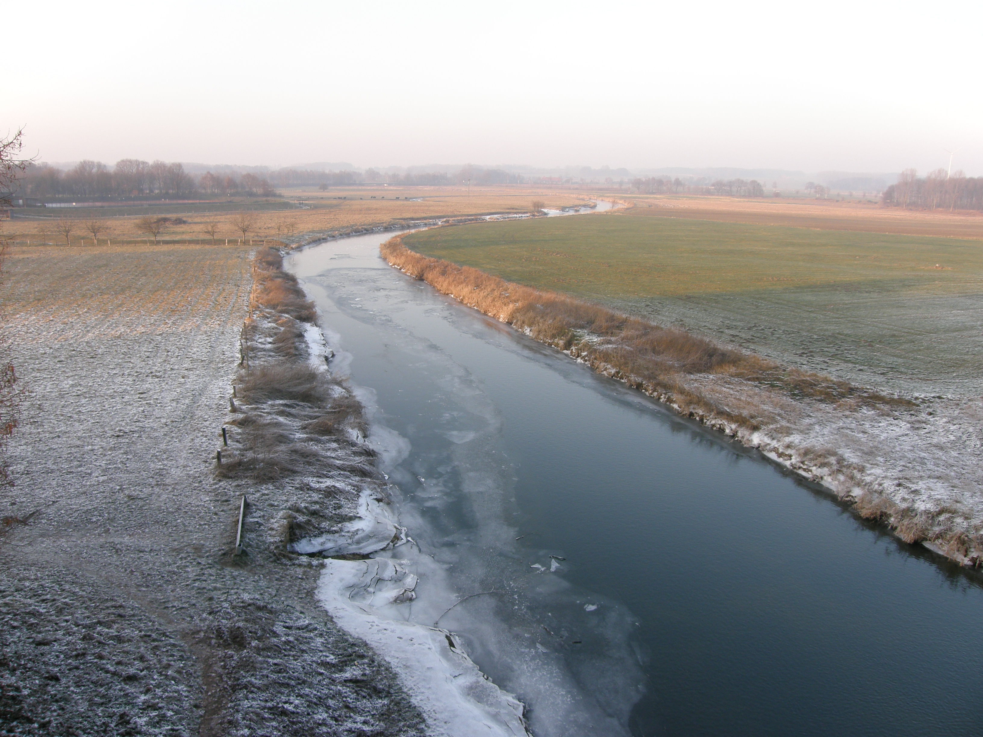 Blick von der Brücke der Alten Fahrt des Dortmund-Ems-Kanals in Olfen auf die teilweise zugefrorene Stever.